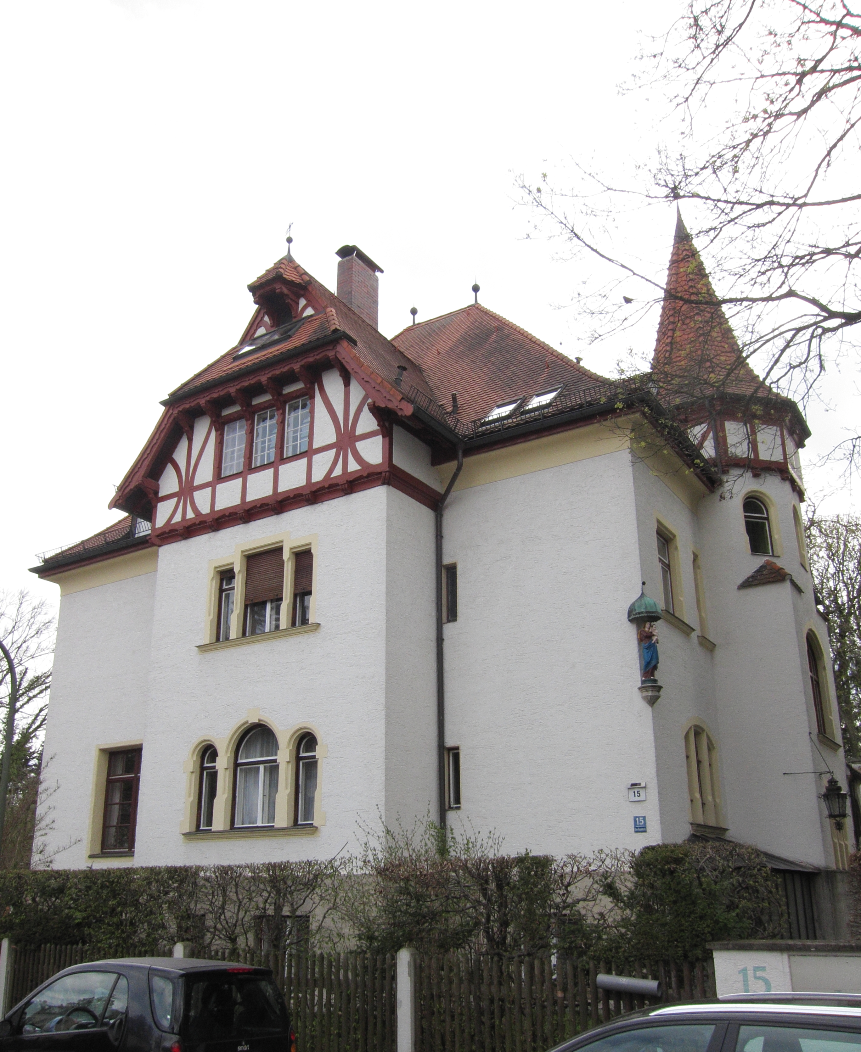 Bierbaumstraße 15; Malerische Villa, mit Fachwerk und Turm, 1899–1900 von Heinrich Volbehr; mit Hausmadonna.